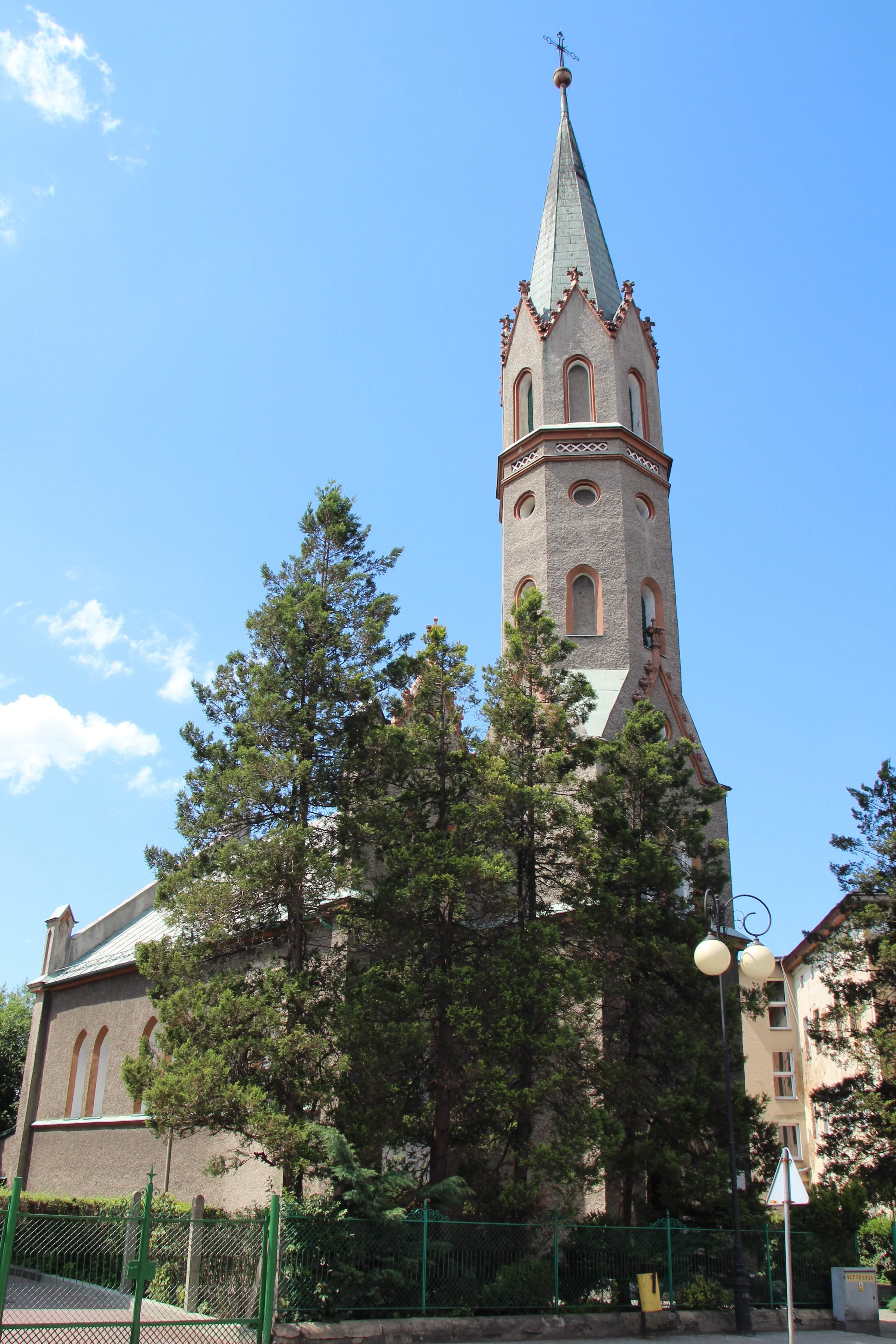 Kościół pw. Św. Franciszka w Głuchołazach - miasto w Polsce w województwie opolskim, w powiecie nyskim.